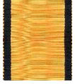 eigen tekening